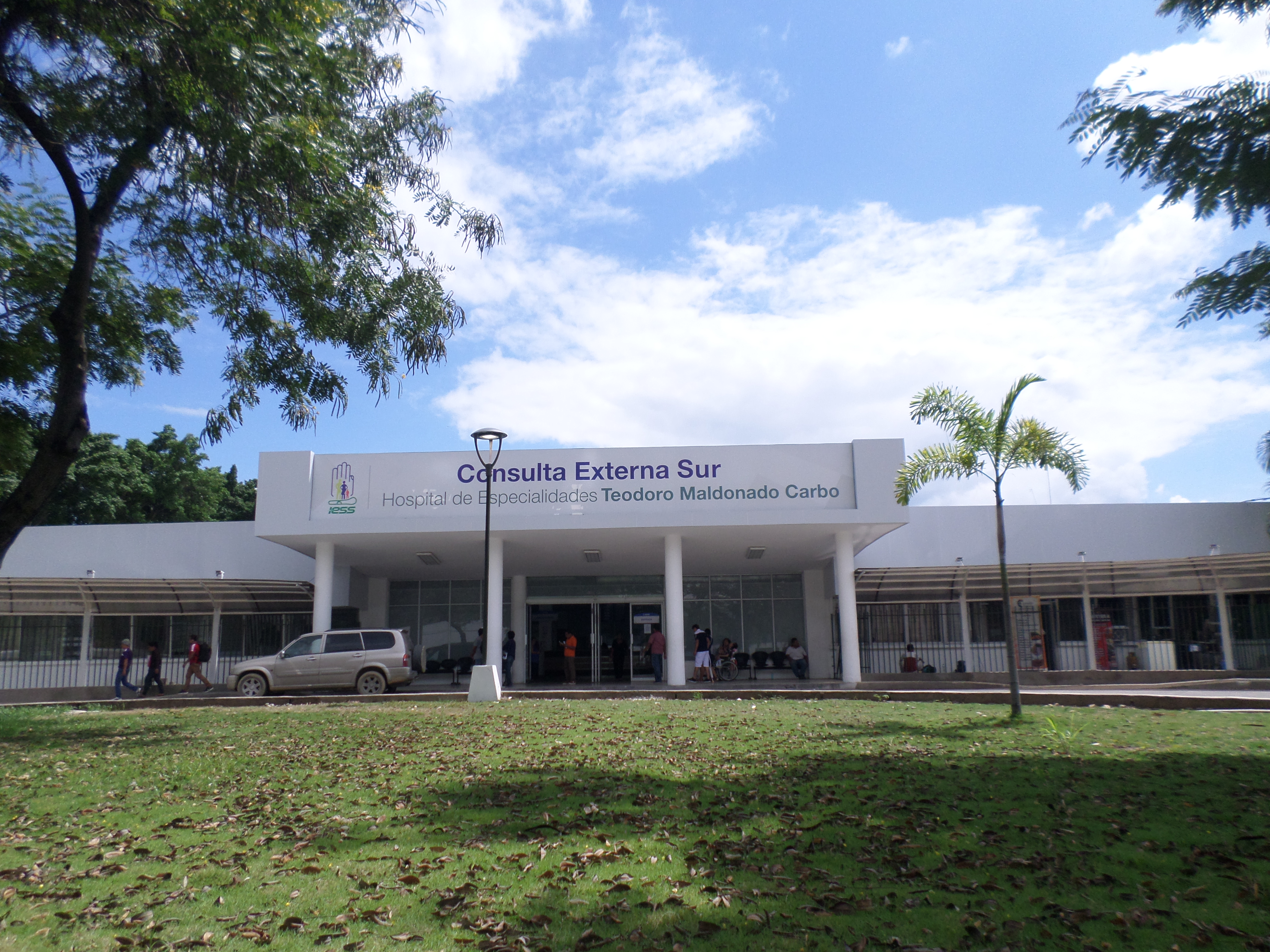 Vista desde el ingreso al público